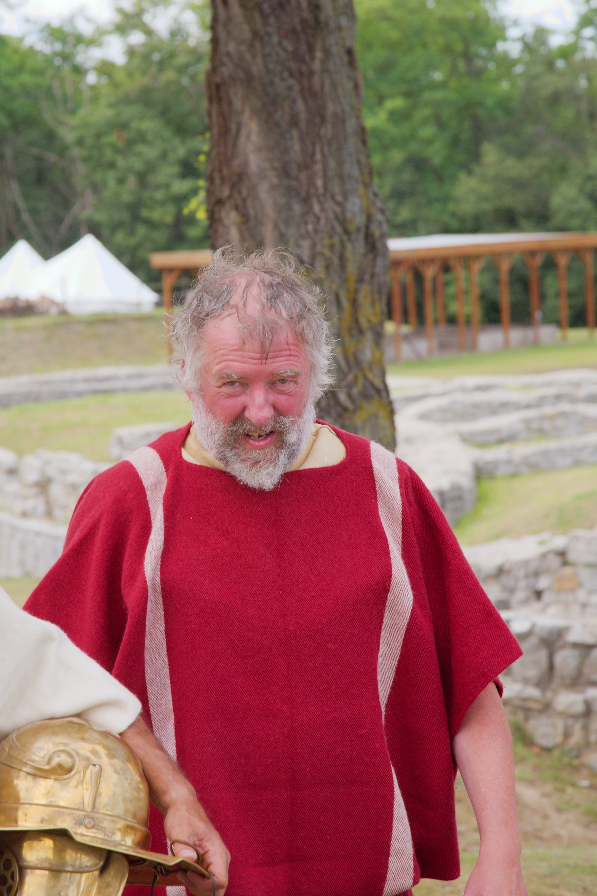 Marcus Junkelmann in Carnuntum